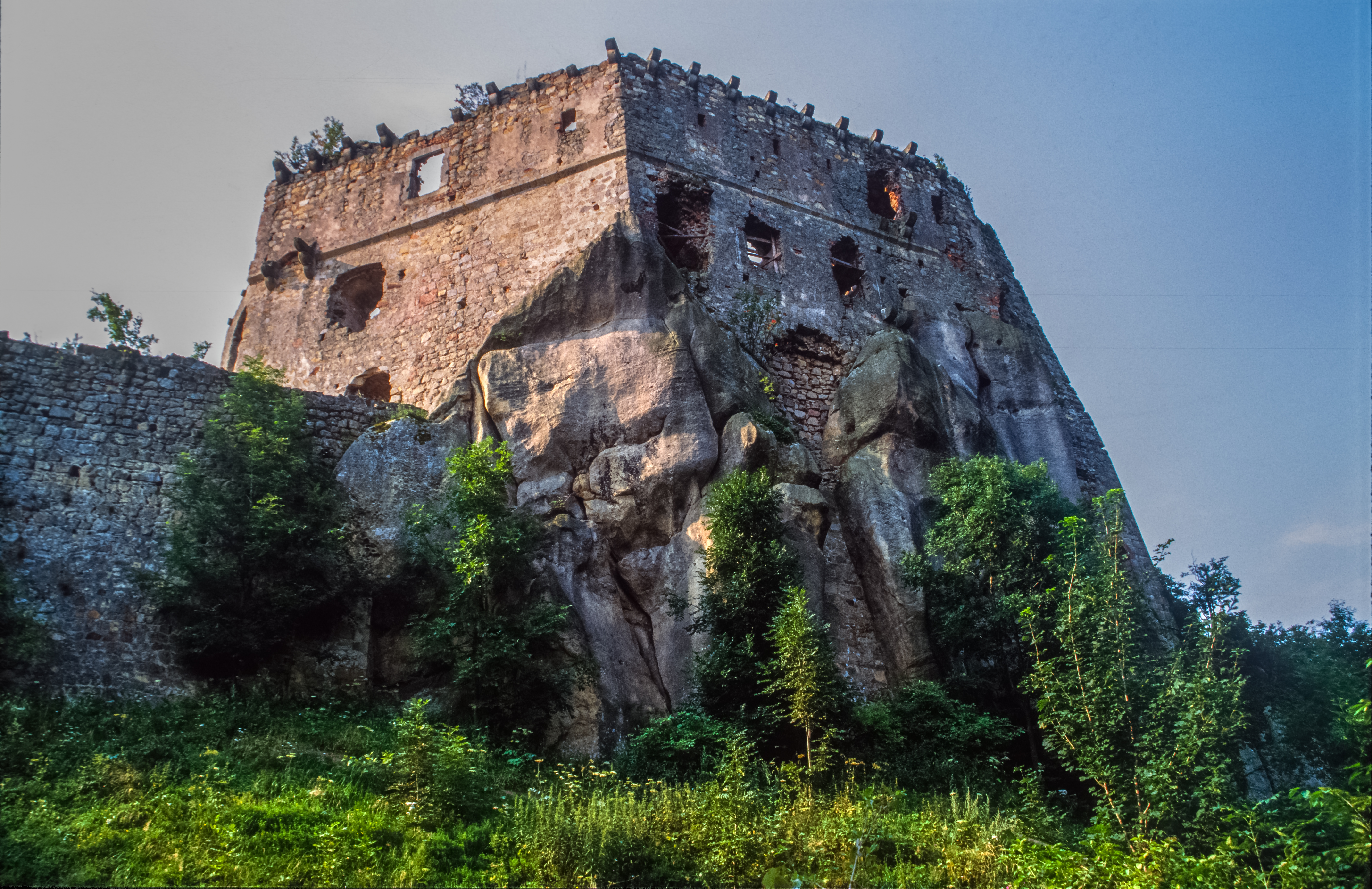 Odrzykoń, zamek Kamieniec, ruiny zamku